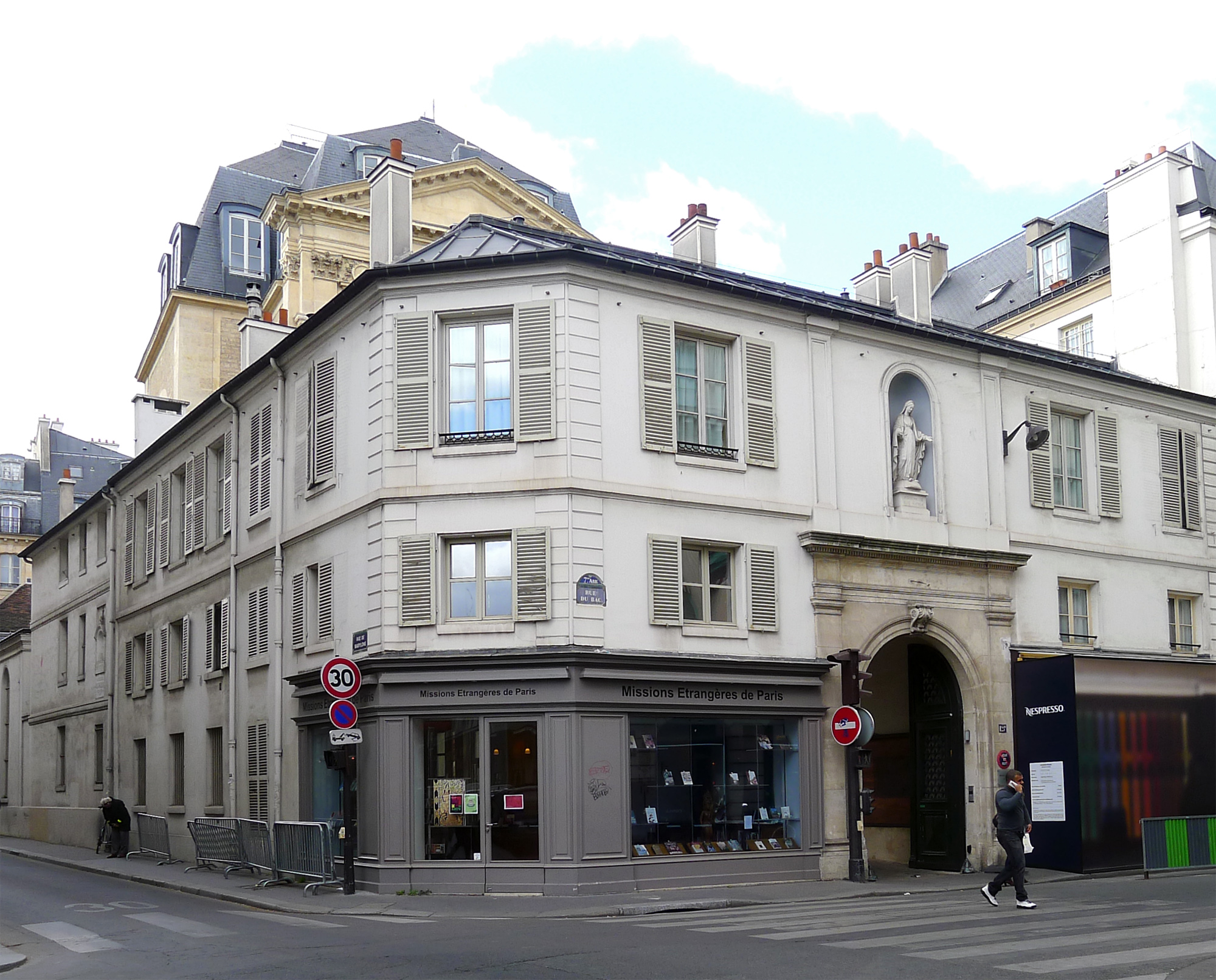 Missions étrangères de Paris (entrée rue du Bac, n°128) - Paris VII